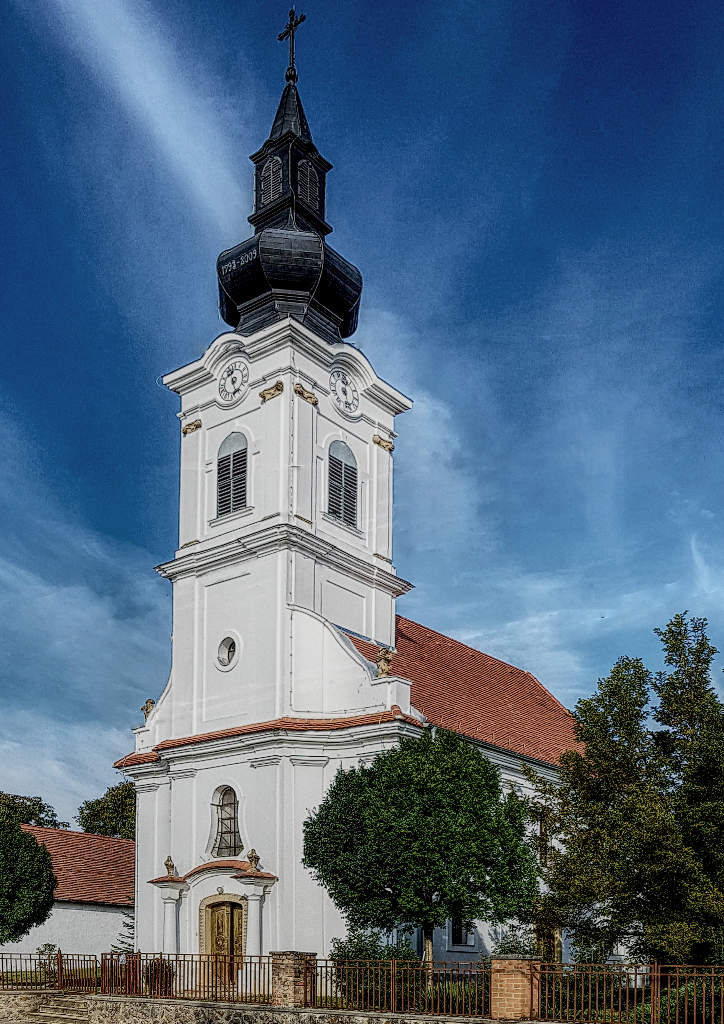 Hidas, evangélikus templom